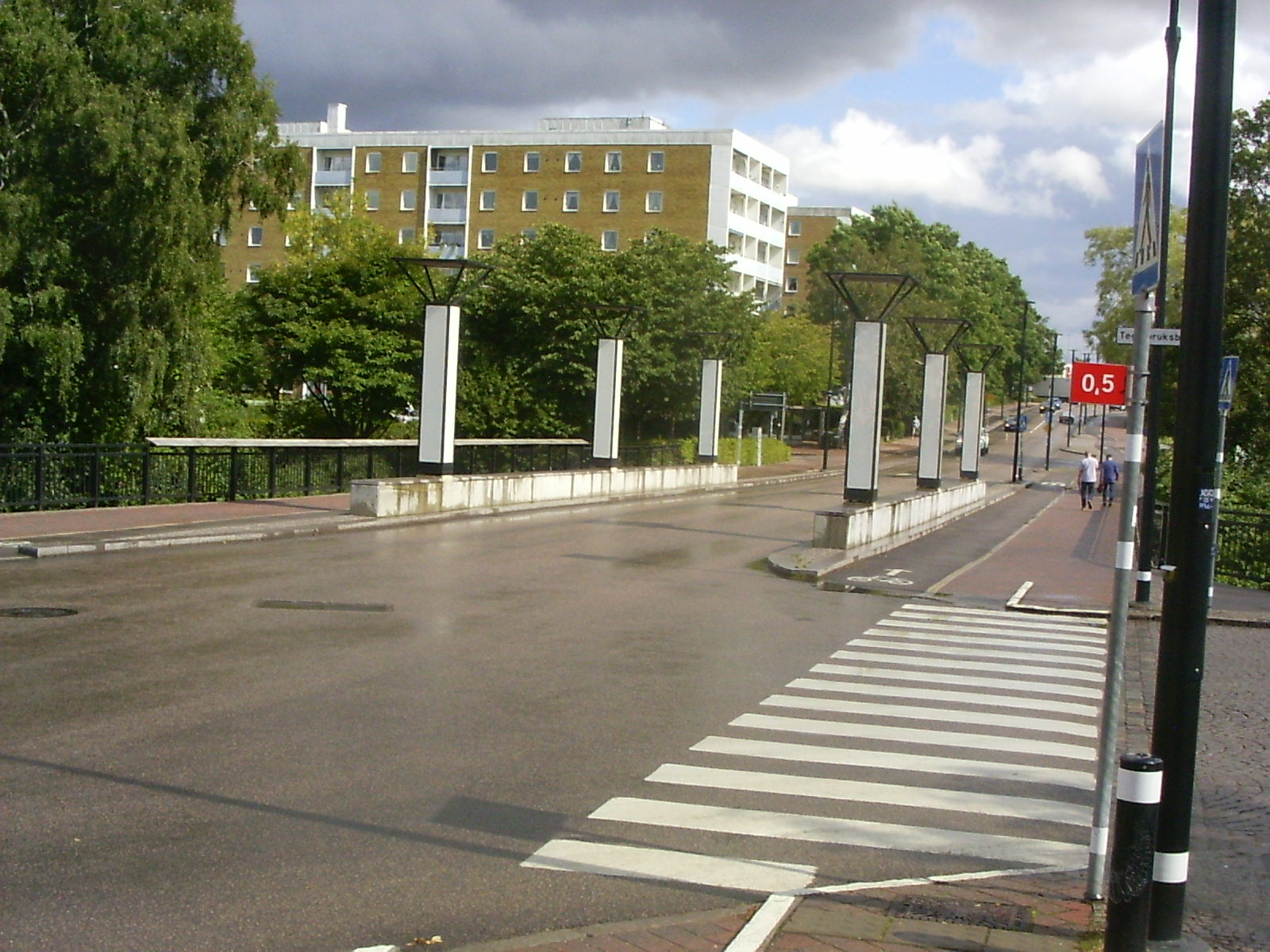 Ängelholm, Zalmstraat, zuiltjesbrug